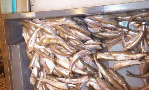 Frischer Stint.